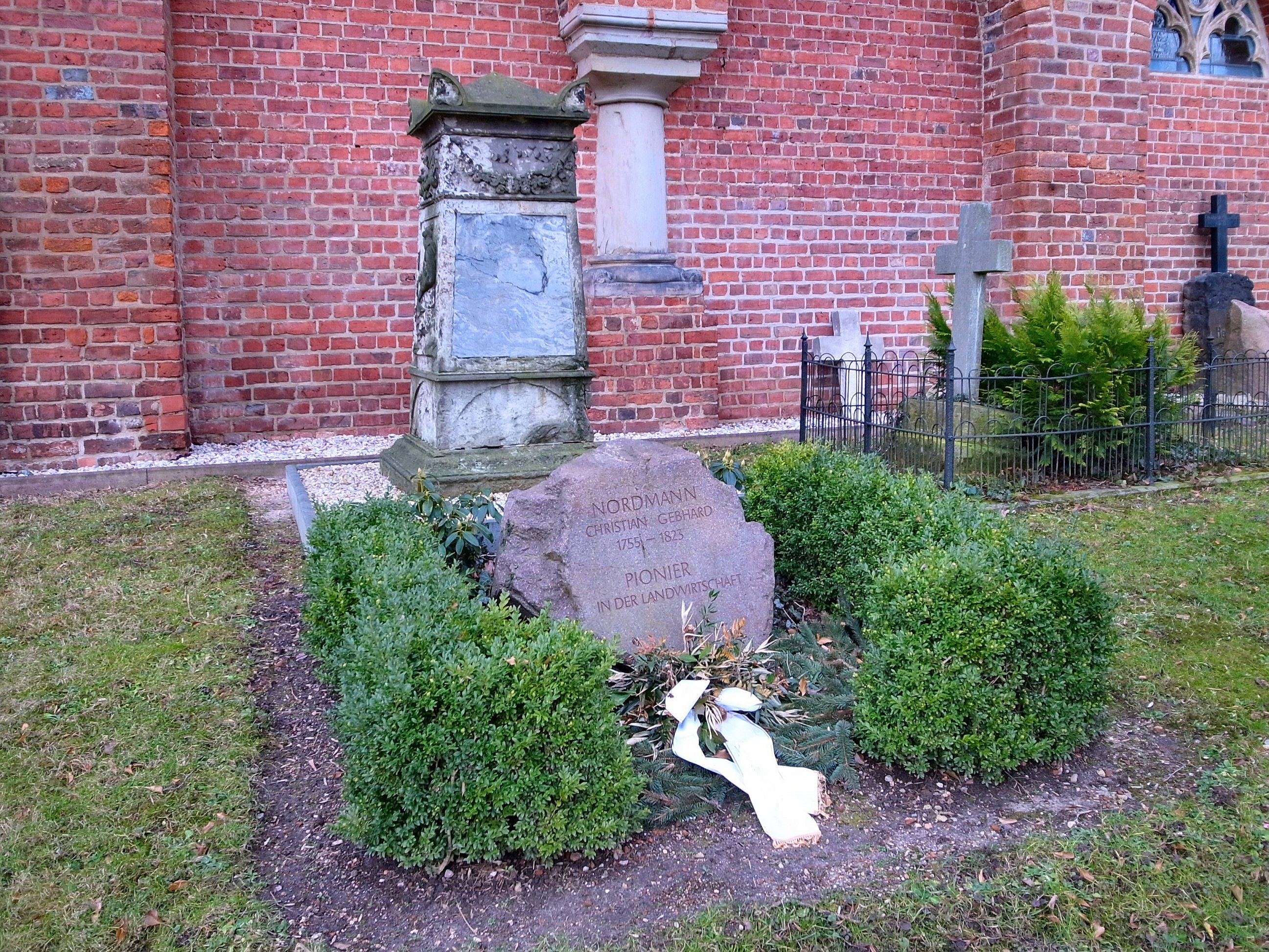 Dessau-Mildensee,Nordmann Ehrenmal